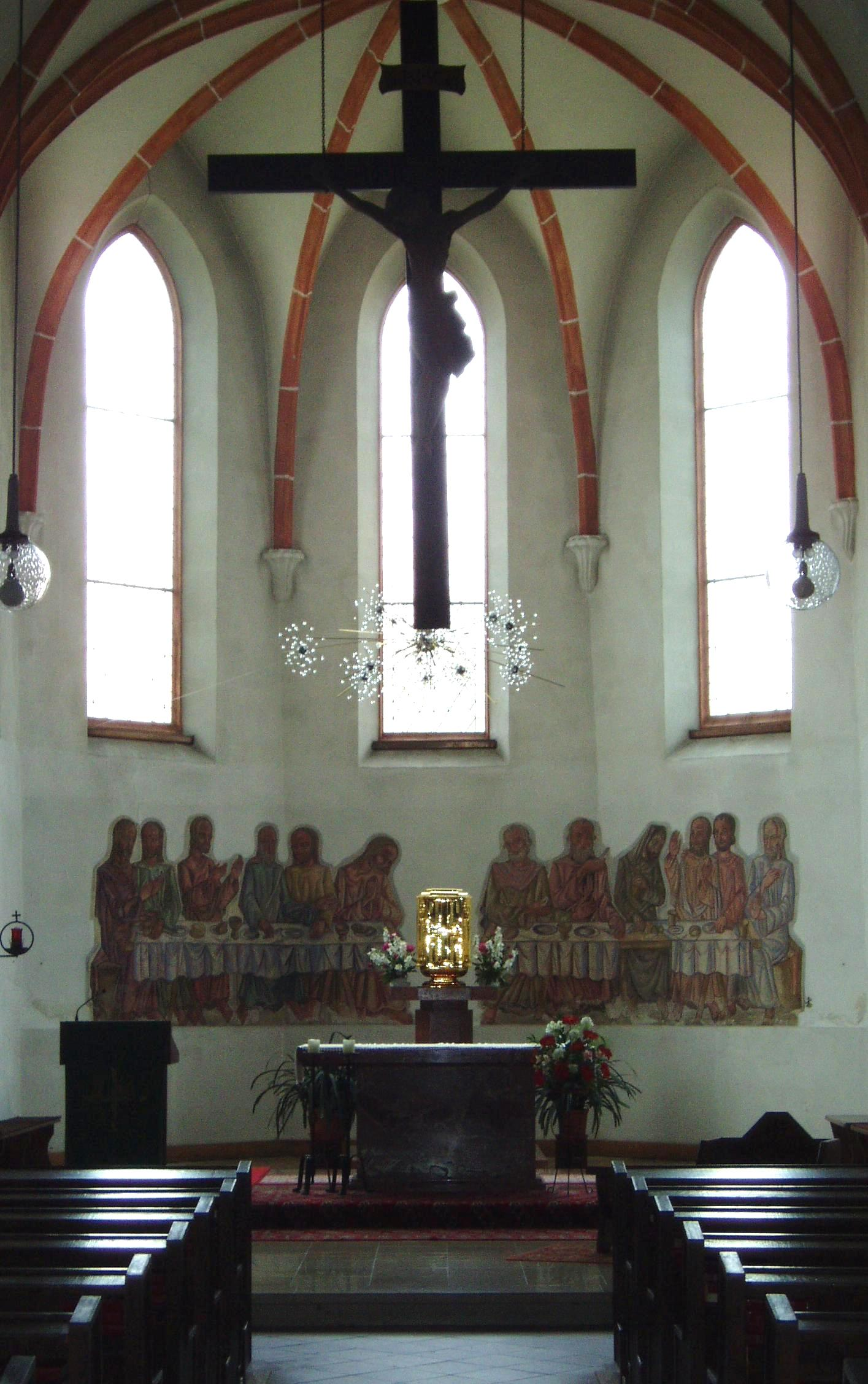 Der Altar der Allander Kirche.